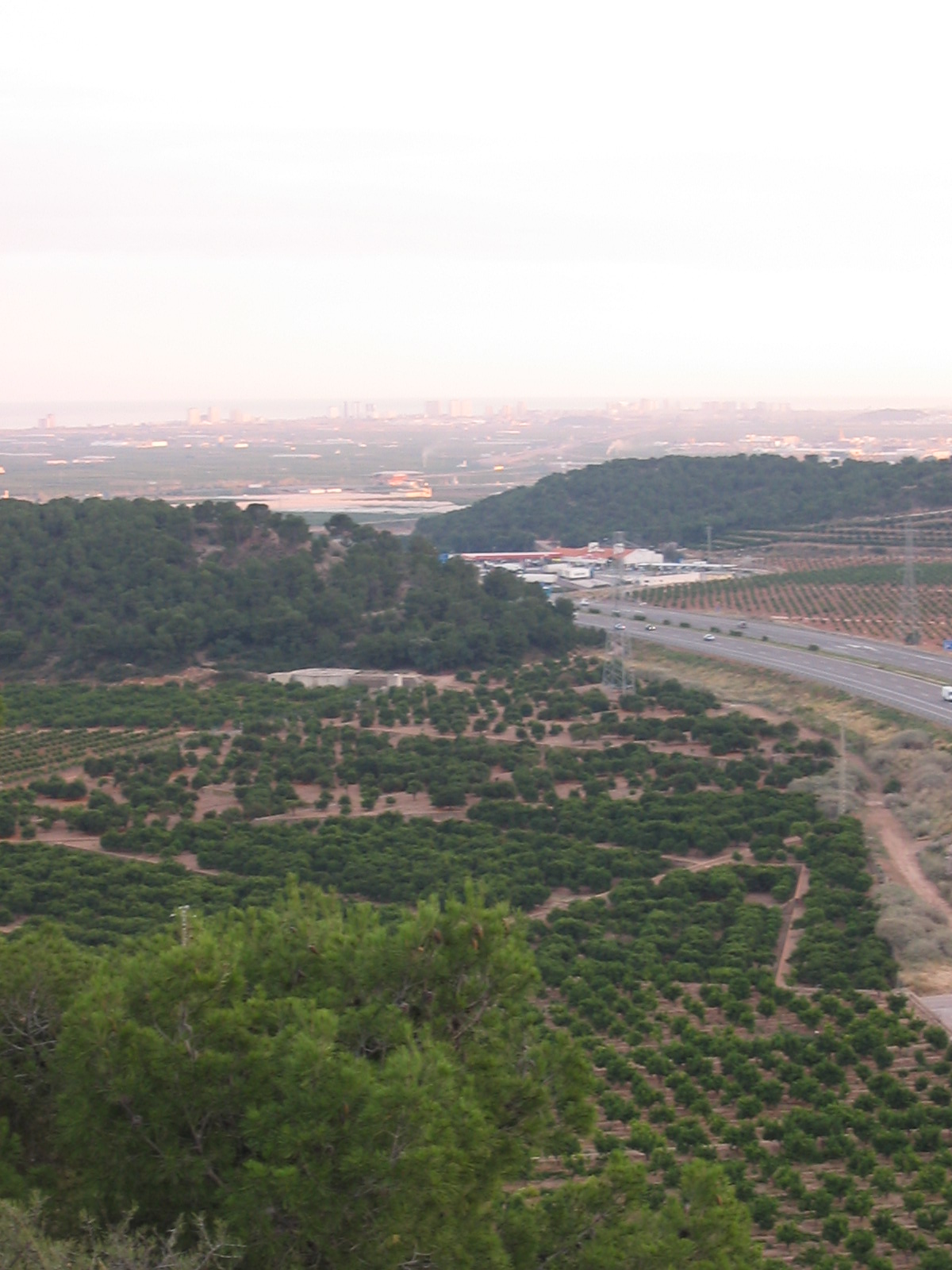 Panorama de la région de Sagunto (Espagne, Valence). Je suis l'auteur du cliché pris en janvier 2004. J'ai descendu à l'escalade le promontoire pour rejoindre la station-service au fond et repartir en auto stop à Barcelone !